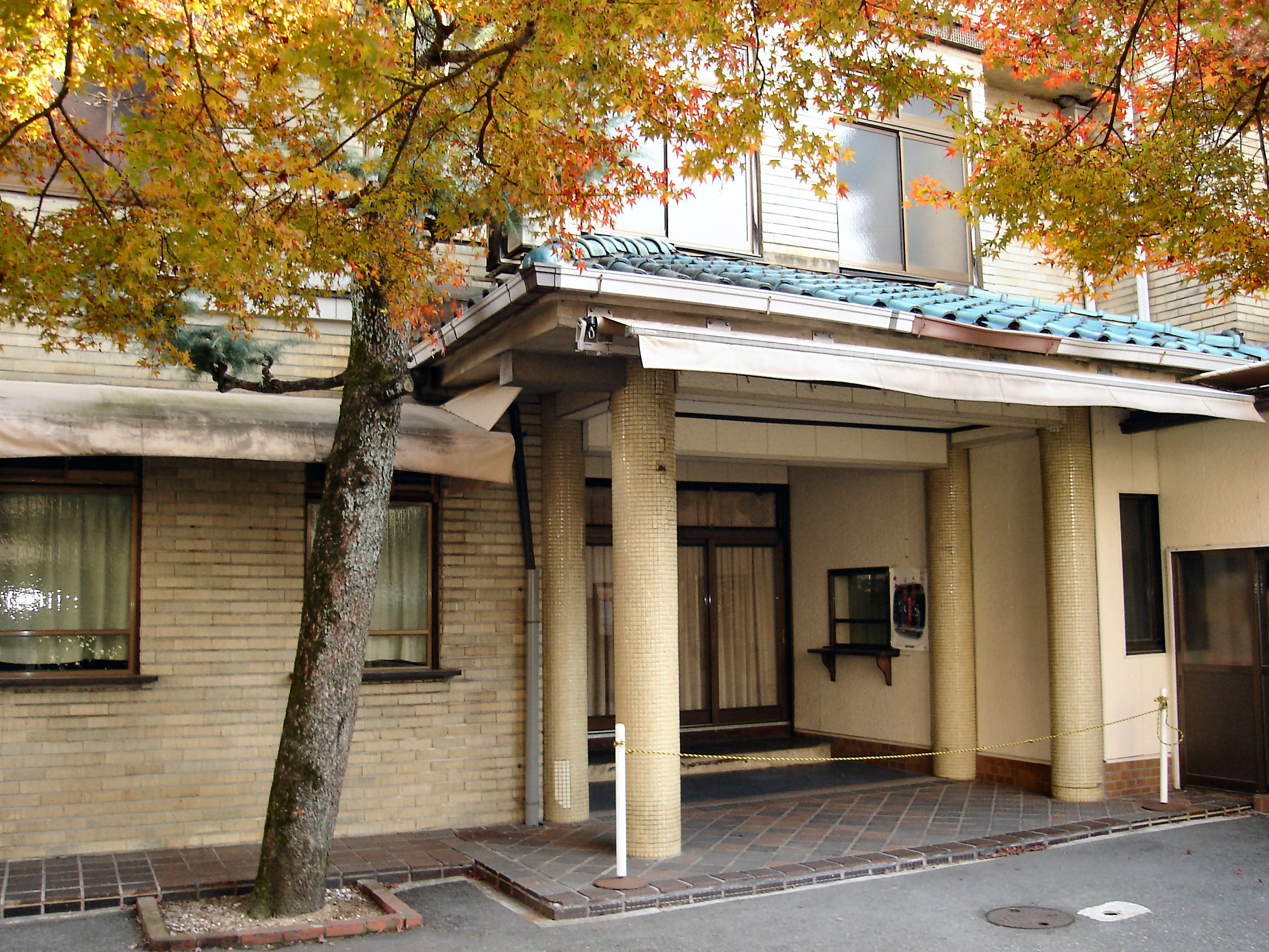 KamiShichiken Kabuernjyo, Kyoto, Japan